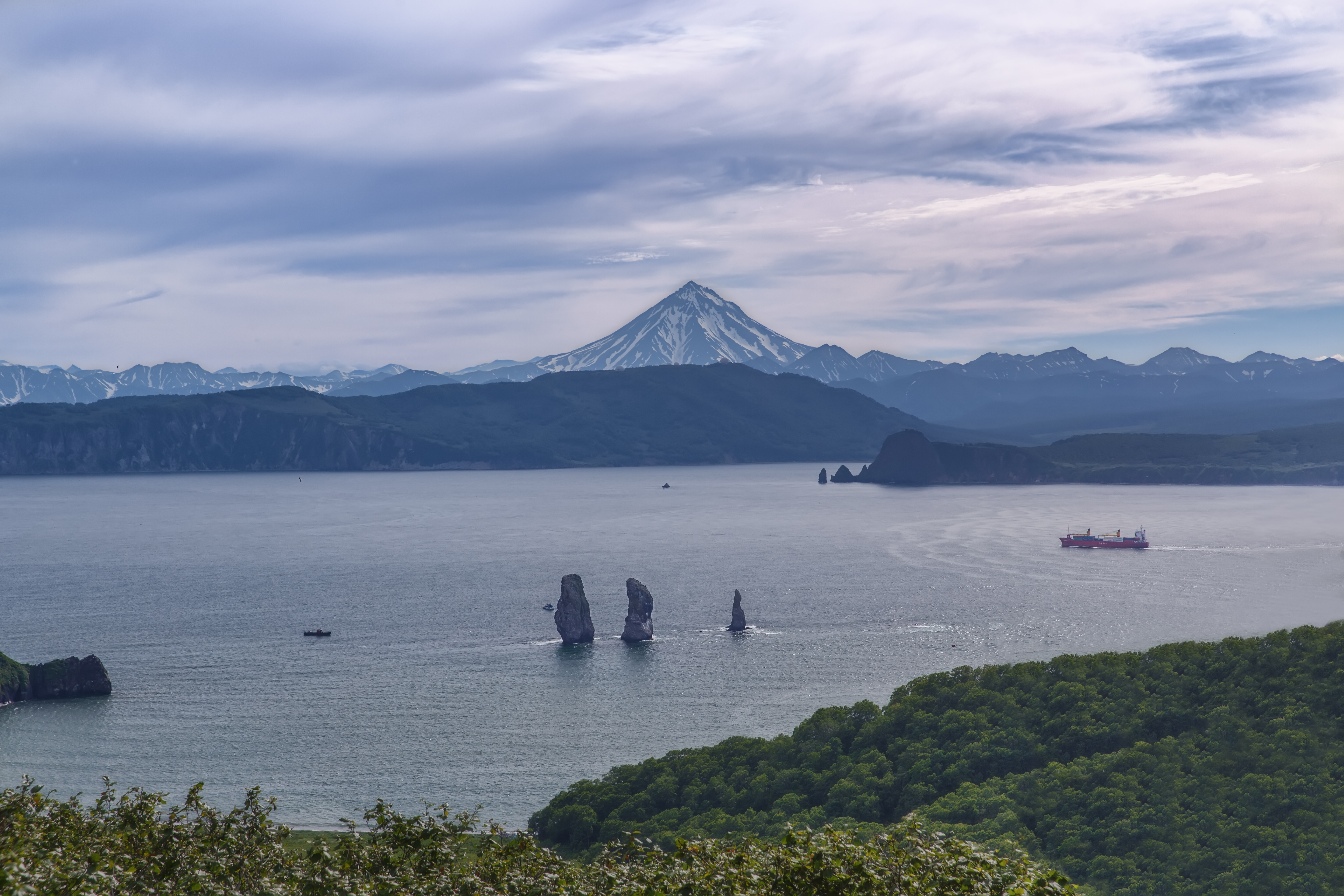 Скалы 'Три брата': Находится у входа в Авачинскую губу, в бухте Шлюпочная. Скалы Три Брата представляют собой выходящие из воды три каменных столба, располагаются в 300 метрах от береговой полосы. Граница охранной зоны проходит на расстоянии 500 метров от границы памятника природы по всей окружности, Петропавловск-Камчатский, Елизовский район, Камчатский край This image is related to the protected area of Russia number 4110058